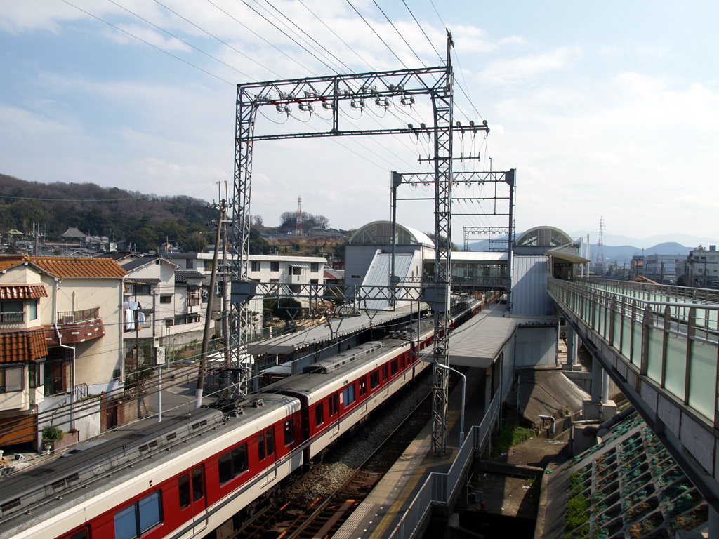 近鉄安堂駅